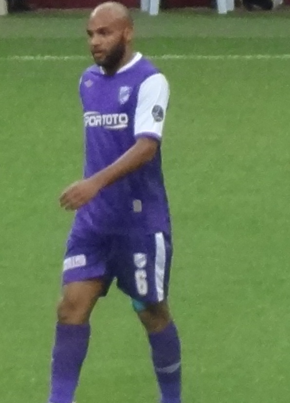 Dalmat Galatasaray karşısında